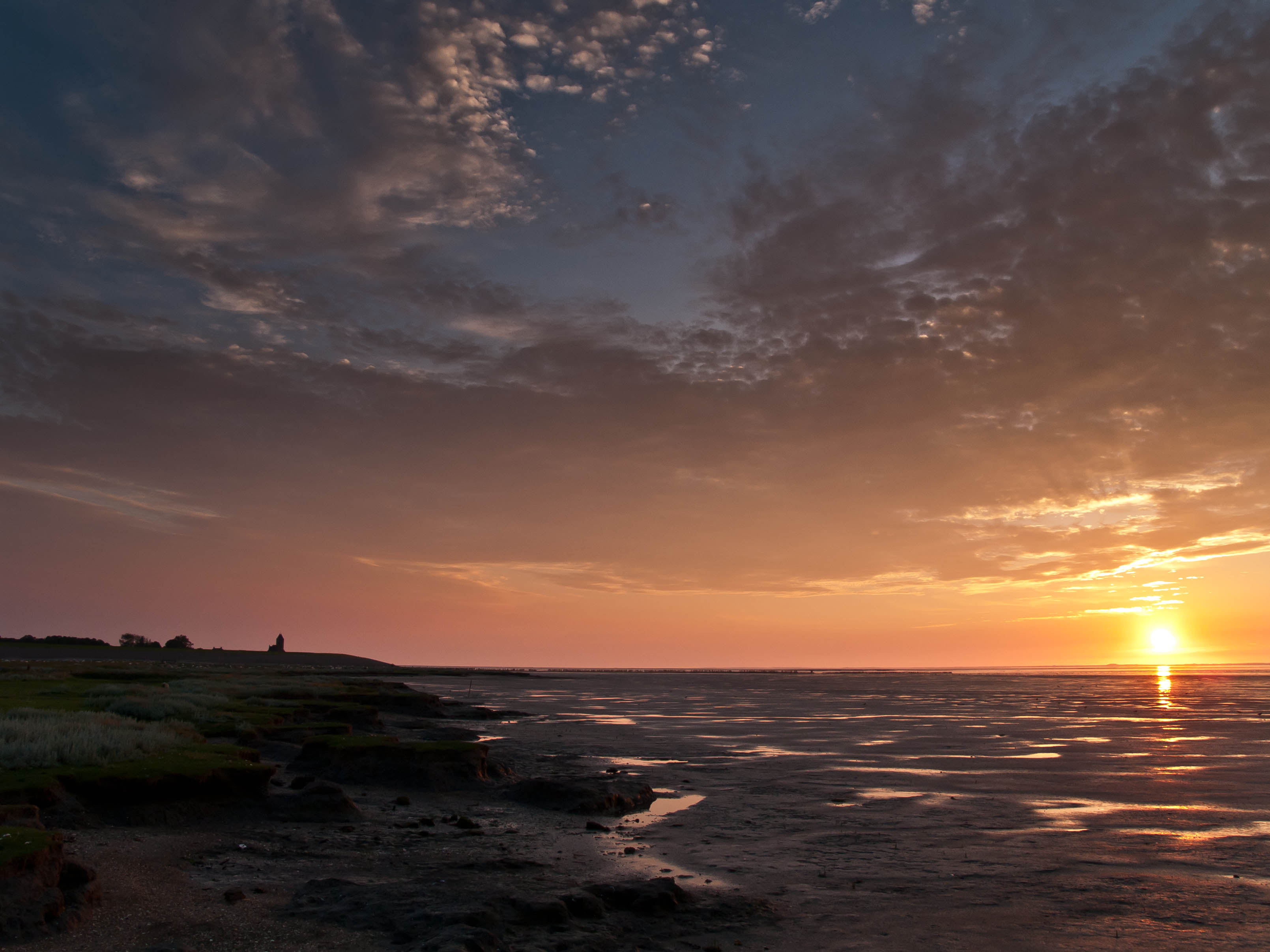 Wadden zee en een silhoutte van de Maria kerk in Wierum